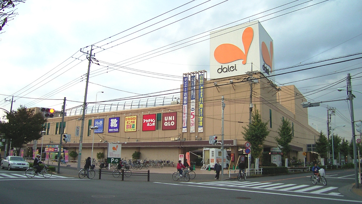 Daiei-Higashiyamato,shopping center Tokyo ダイエー・東大和店 東大和市立野3-1344-1